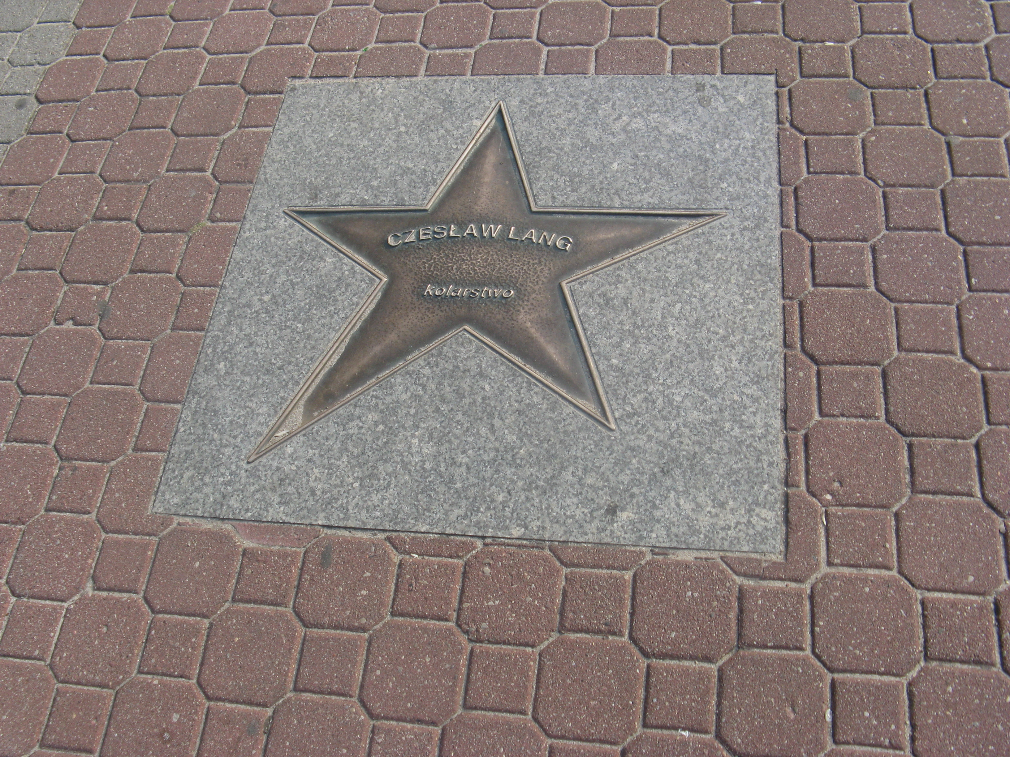 Gwiazda w Alei Gwiazd sportu we Władysławowie